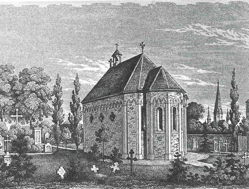 Georgskapelle nach ihrer Transloszierung auf den Alten Friedhof Bonn - Lithografie von Henry und Cohen (um 1850)